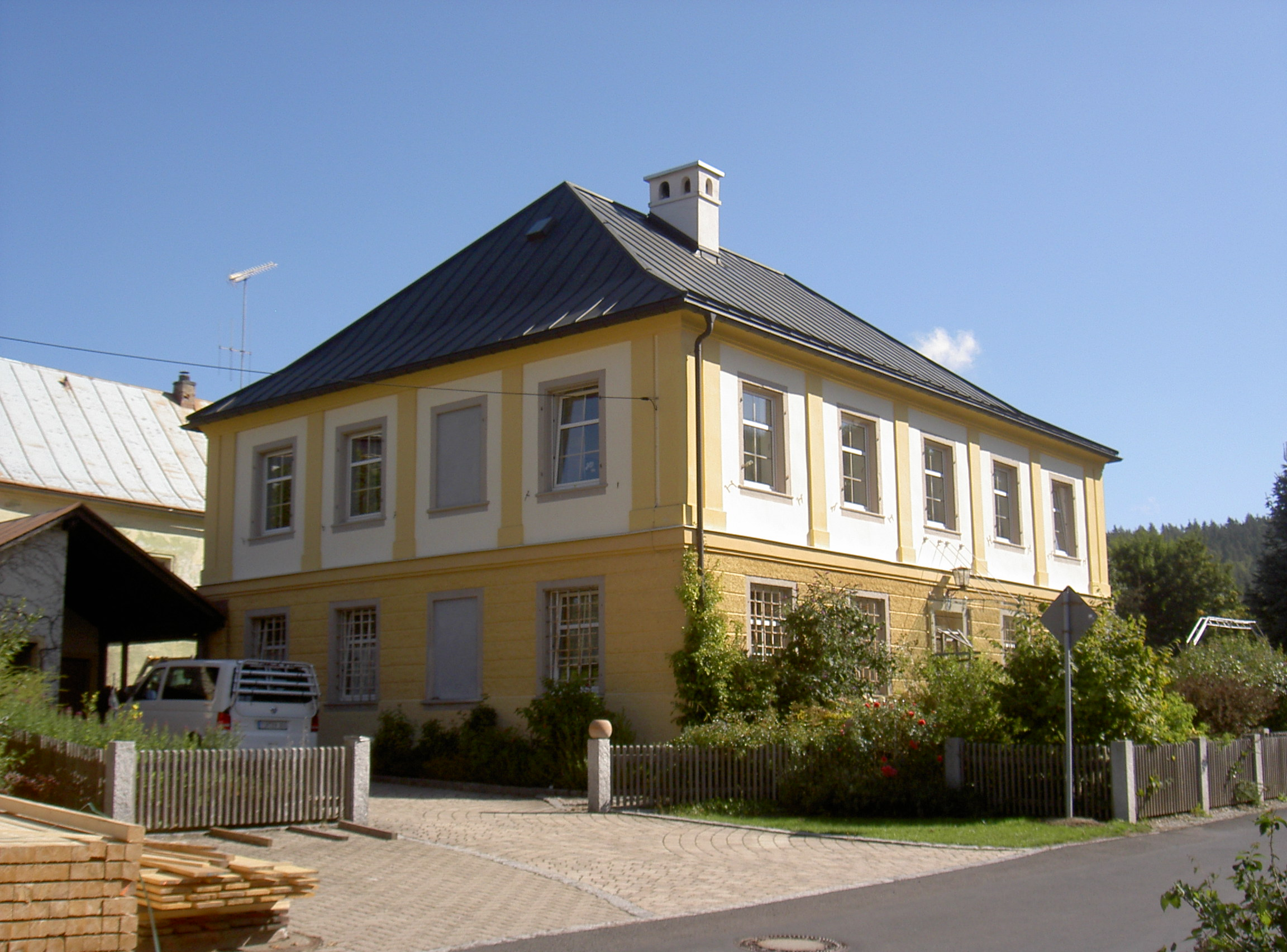 Ehemaliges Königlich-Bayerisches Hüttenwerk Königshütte